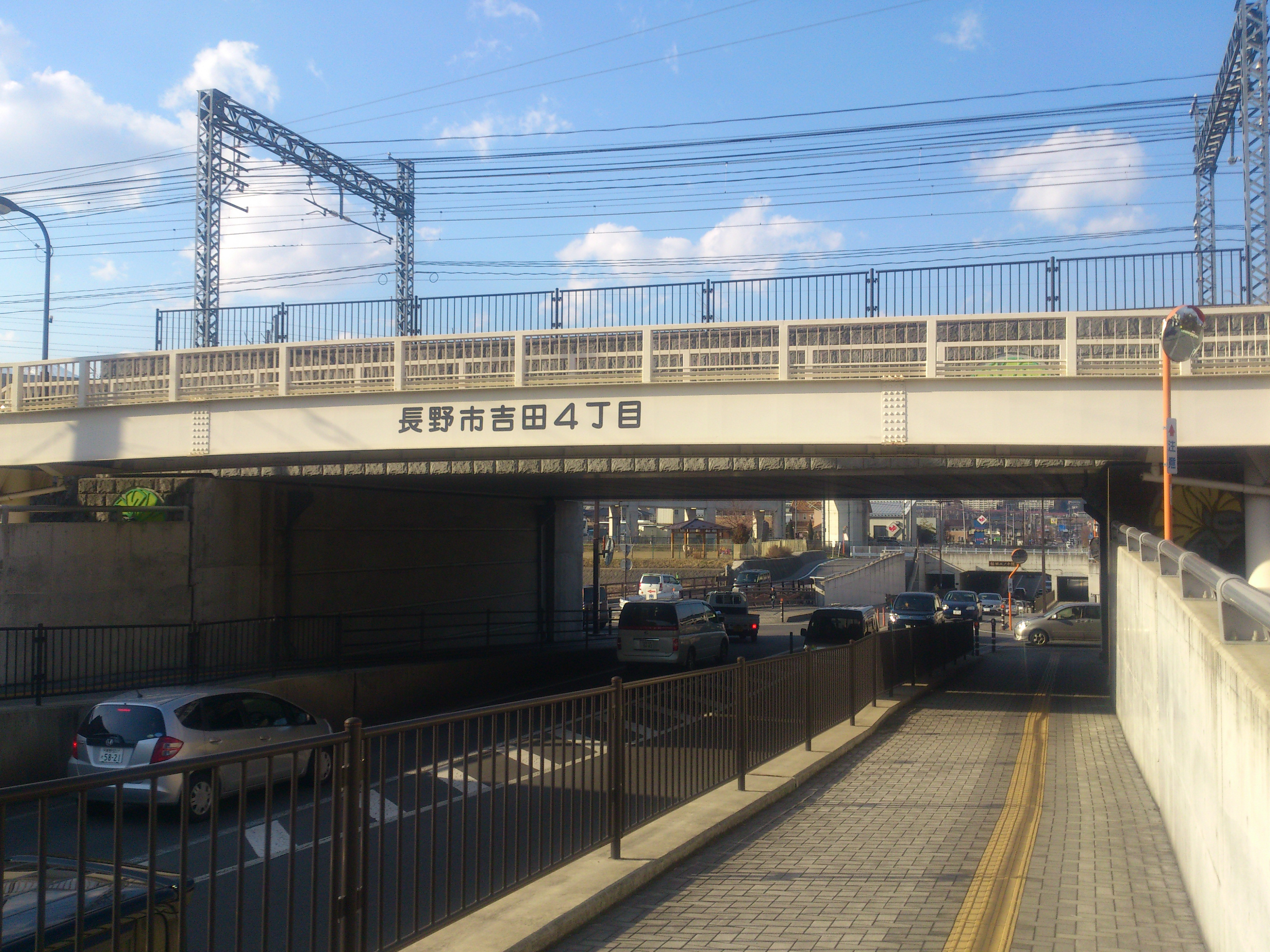 東豊線原町隧道（長野市吉田四丁目）